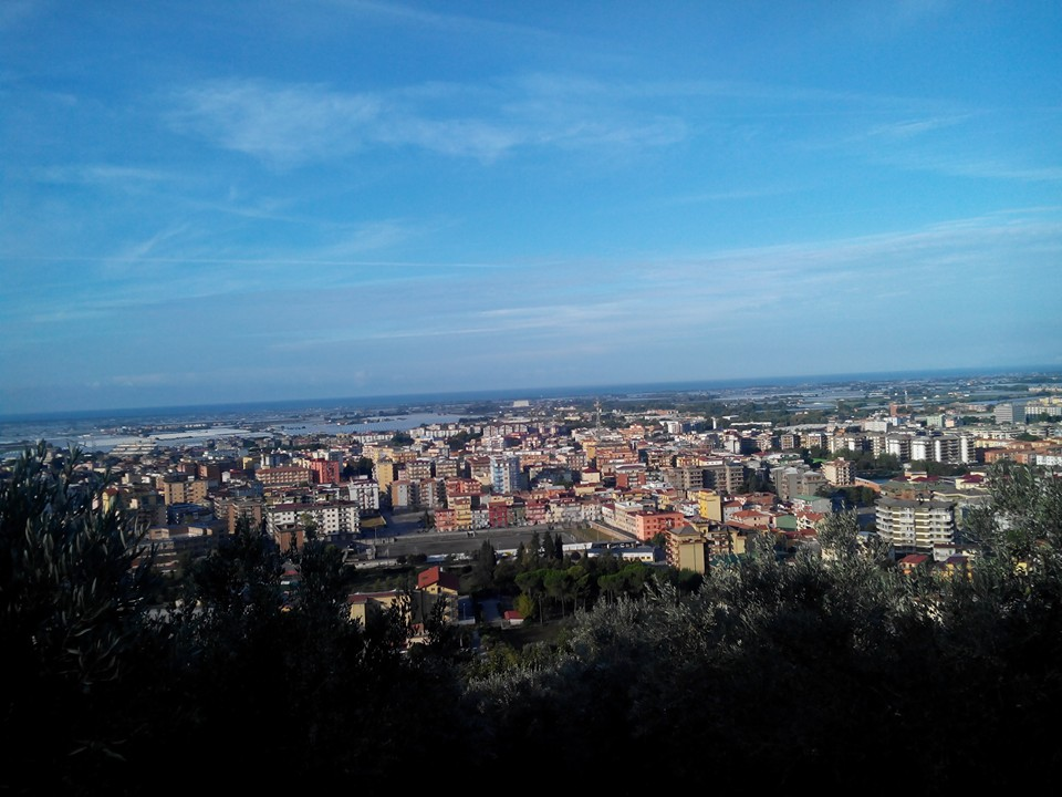 Panorama dalla collina del Castelluccio.